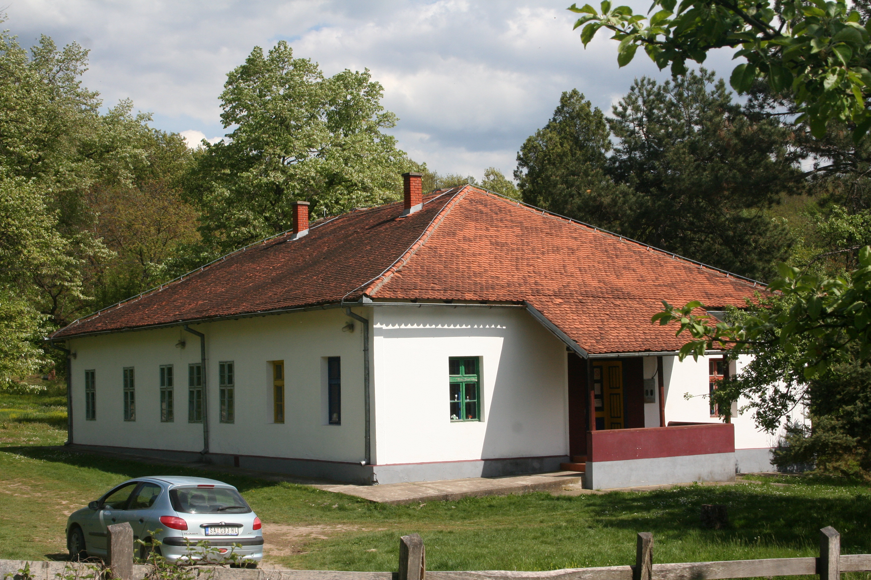 Stara škola u Rabrovici, Divci